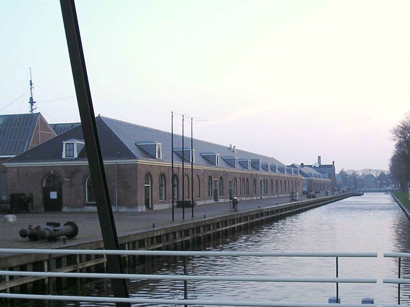 Dit is de Oude Rijkswerf van Den Helder, thans in gebruik voor diverse doeleinden, zoals werkplaatsen, feestzalen, café. Zelf genomen.